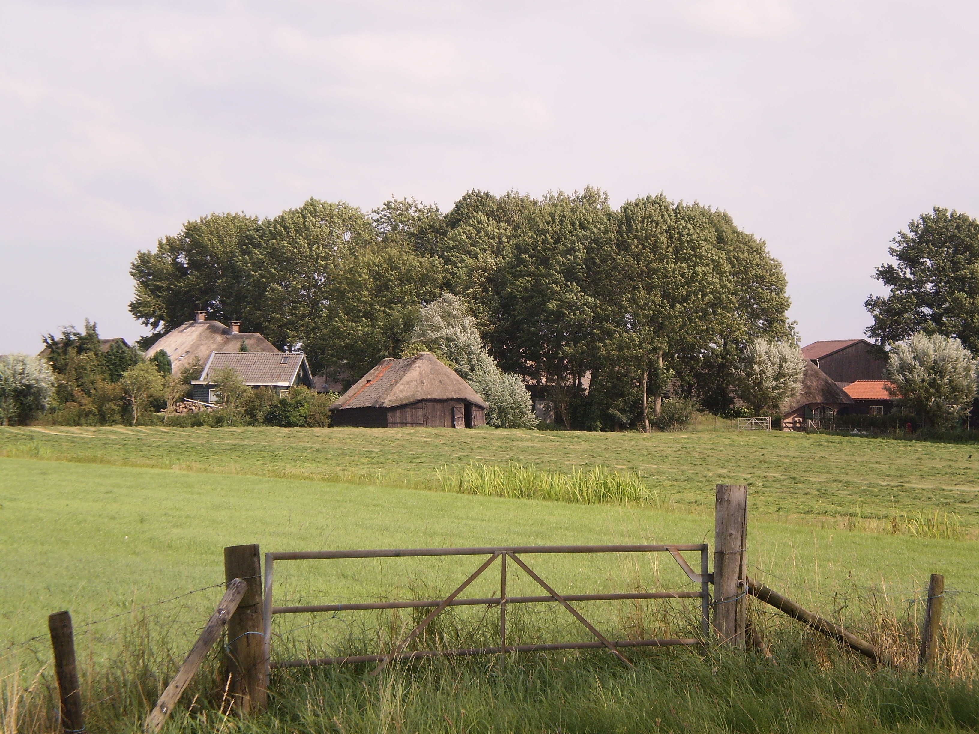 Vanaf de A.P. Hilhorstweg